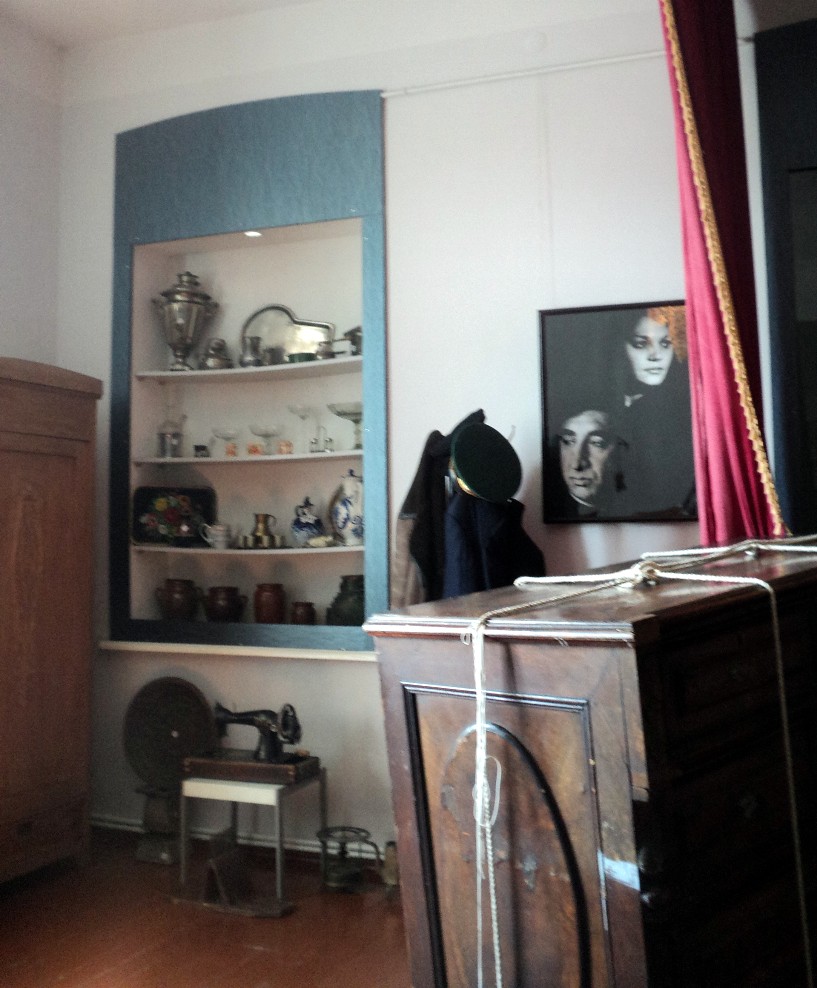 Մհեր Մկրտչյանի թանգարան